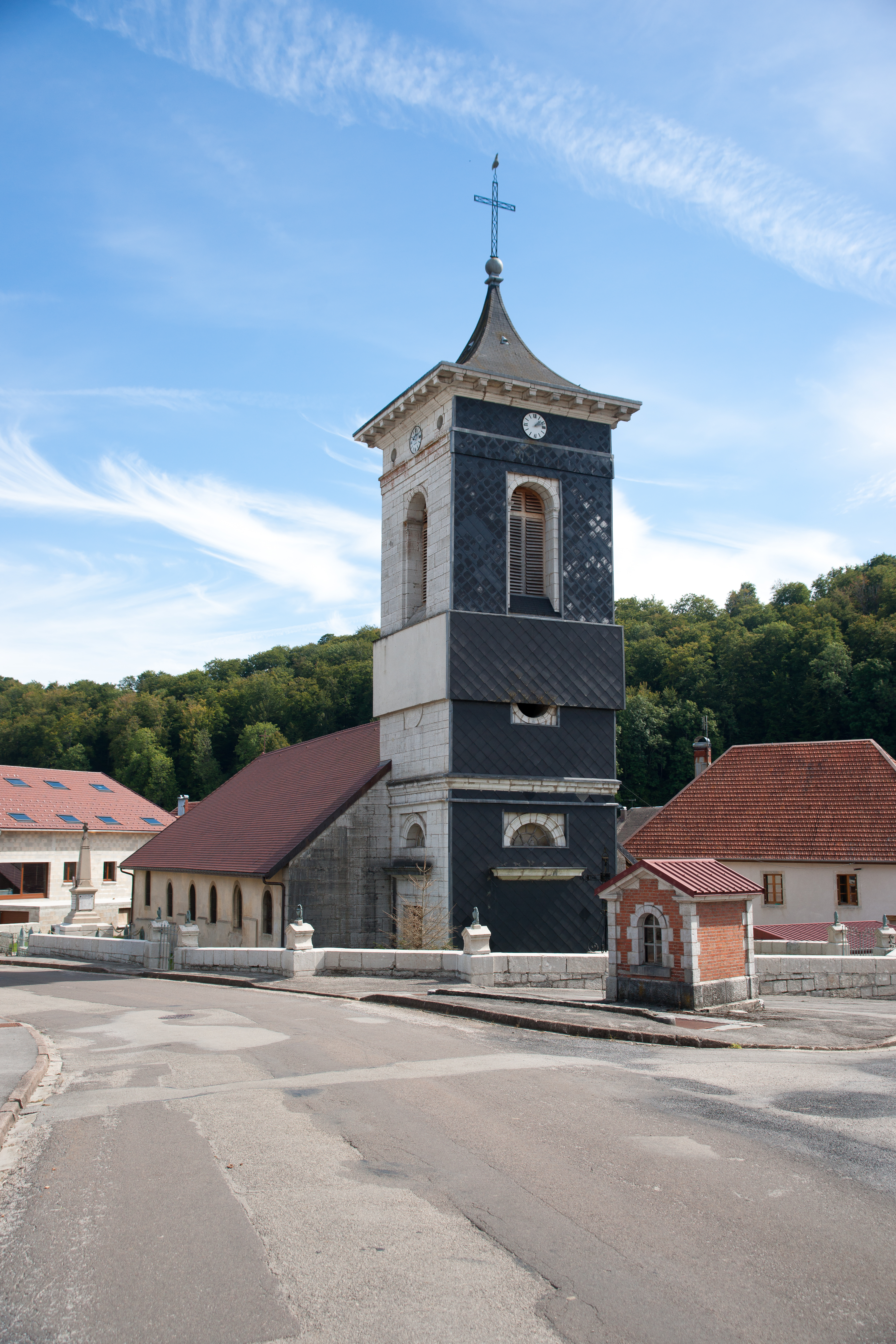 Chapelle d'Huin - église